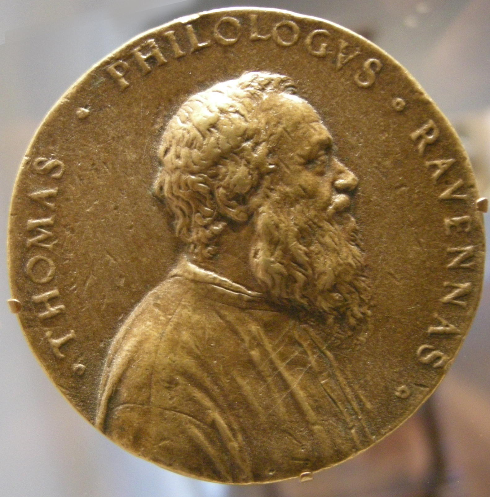 Tommaso Rangone (1493-1577), 1556-58